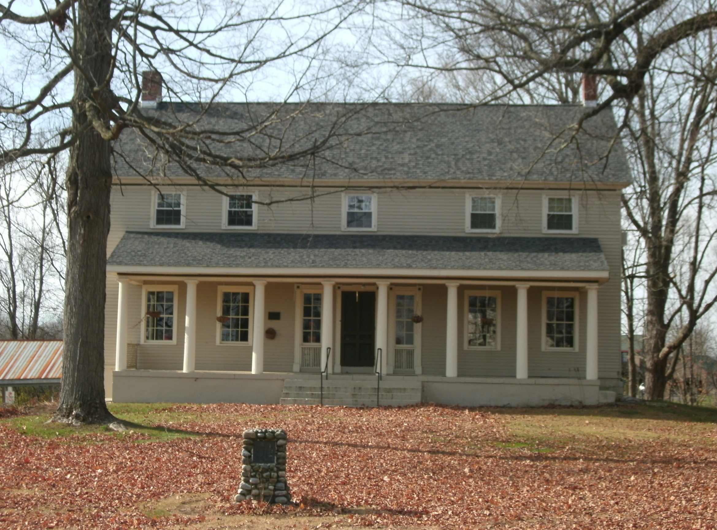 GE DIGITAL CAMERA Gansevoort, New York